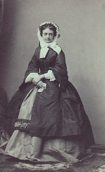 Юлия Хуньяди де Кетей (1831-1919)